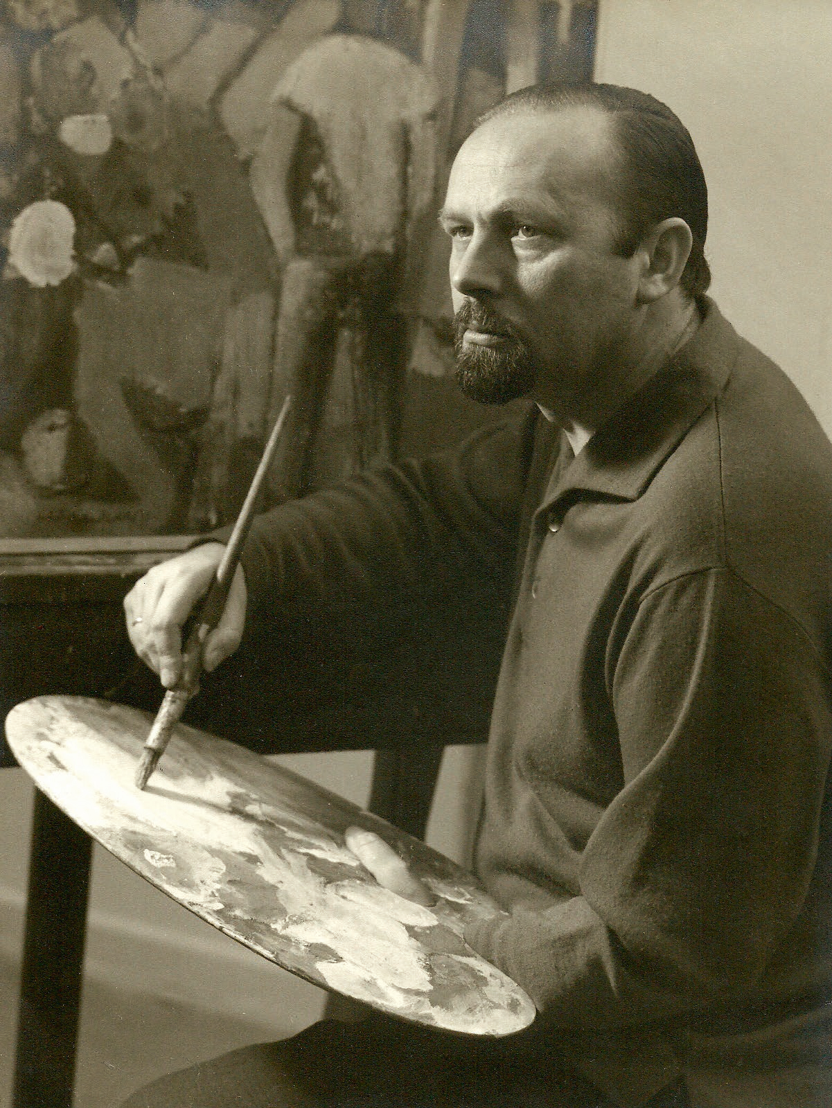 Der Künstler an der Staffelei in seinem Hannoveraner Atelier, 1960